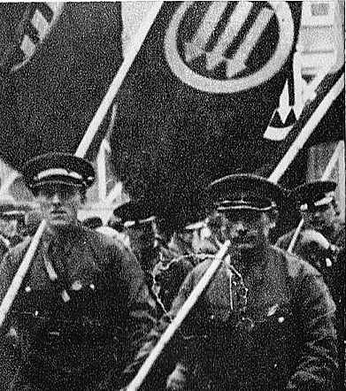 Członkowie Akcji Socjalistycznej w Gdyni przed 1939